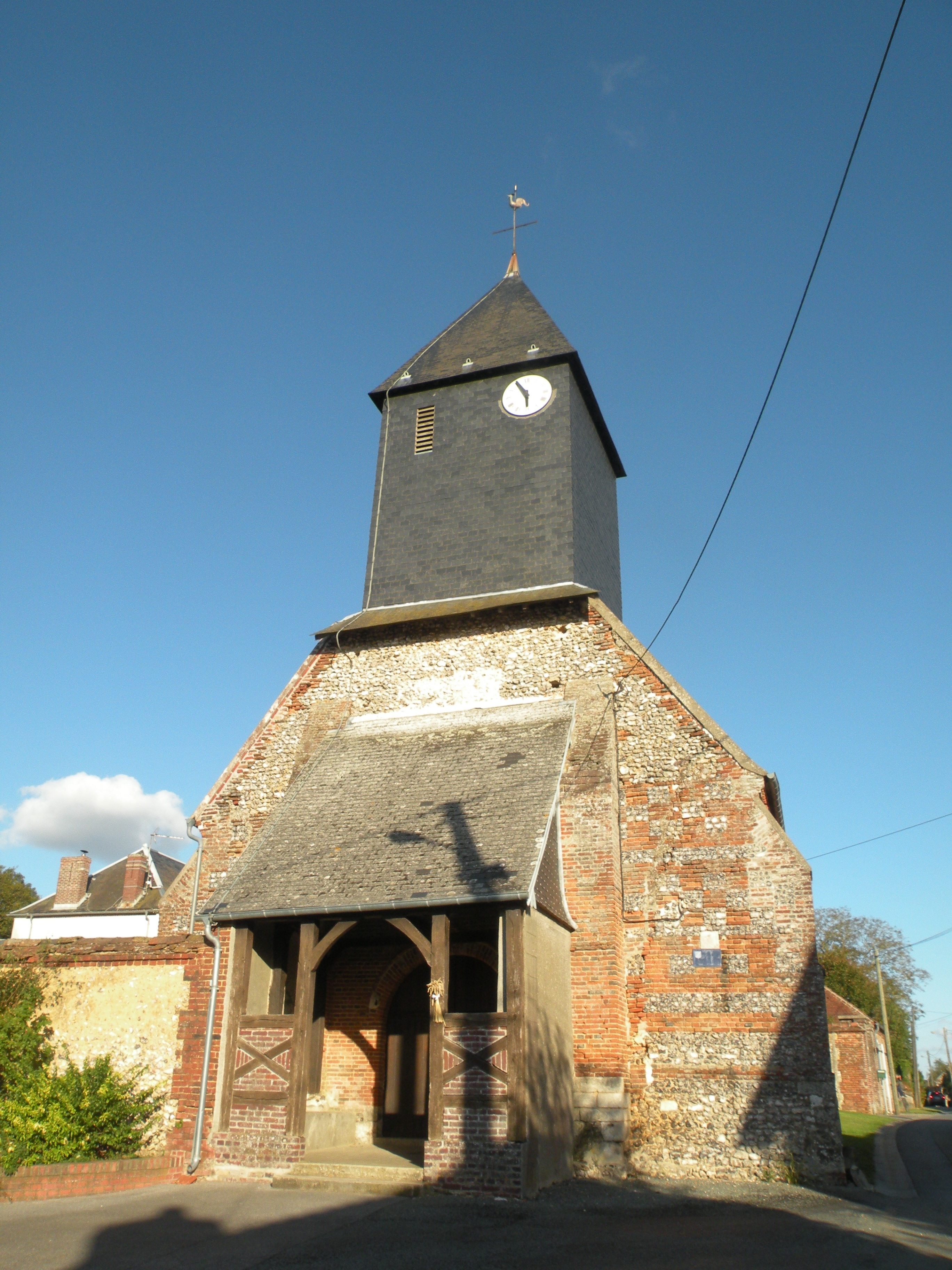 église Notre-Dame Beaumont-les-Nonains